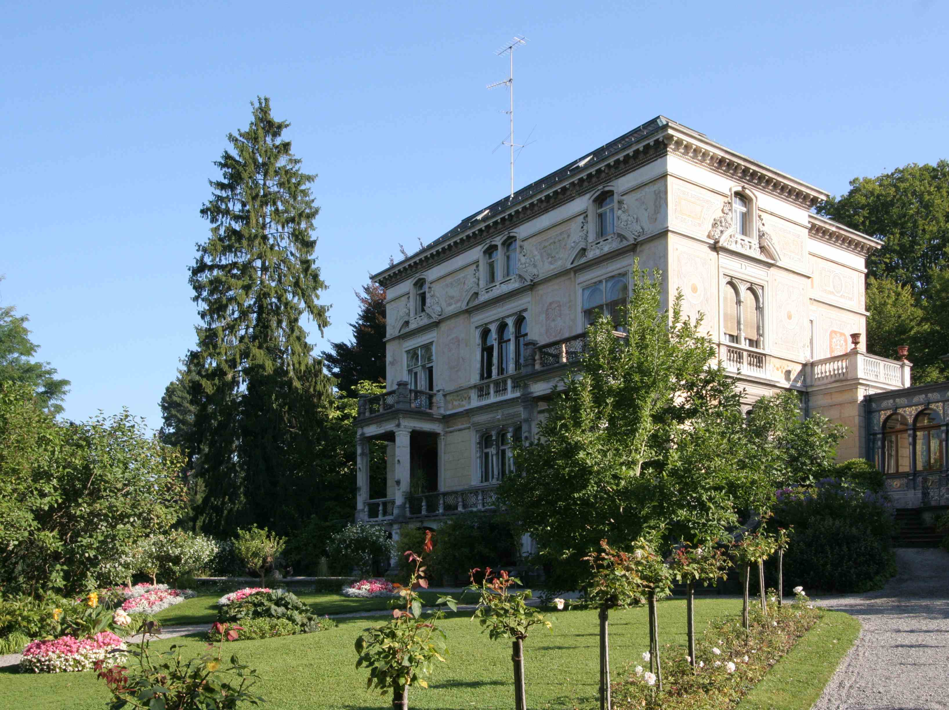 Villa Patumbah in Zurich